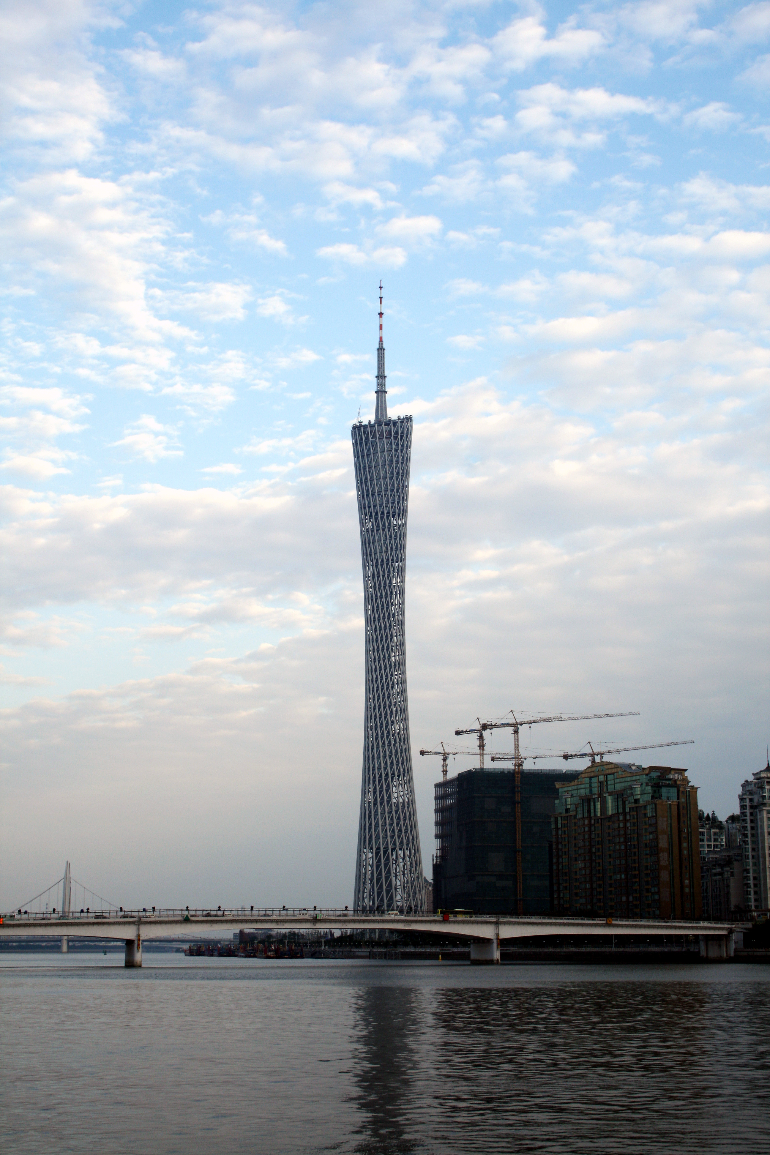 广州大桥及广州塔